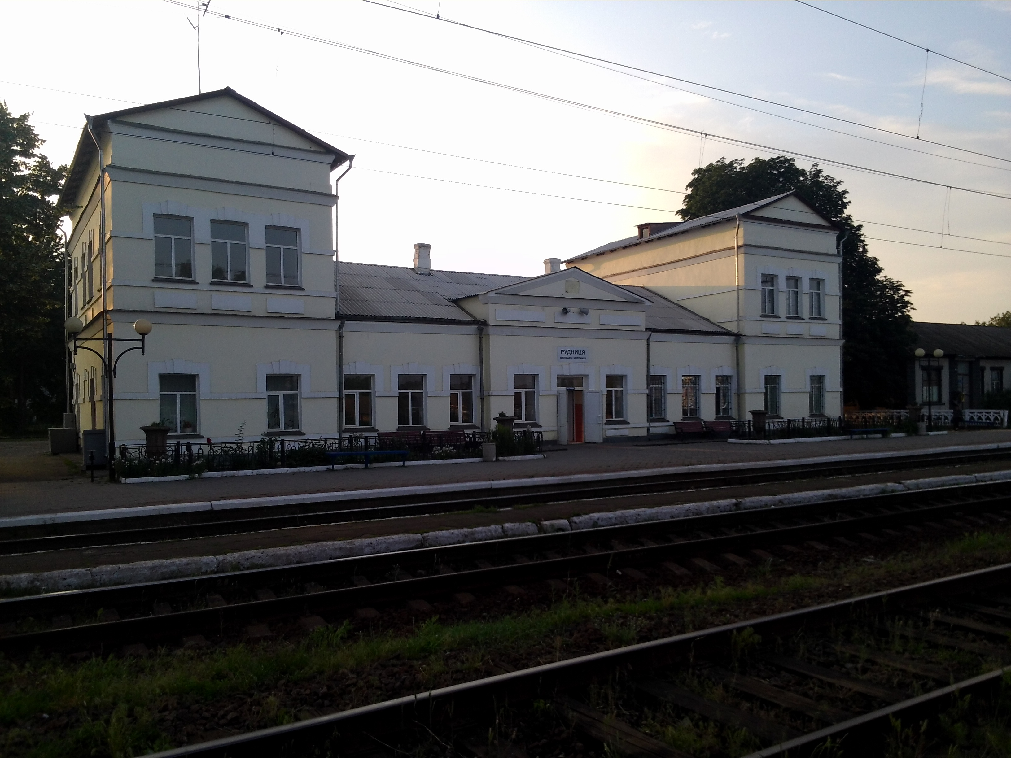 ст. Рудниця